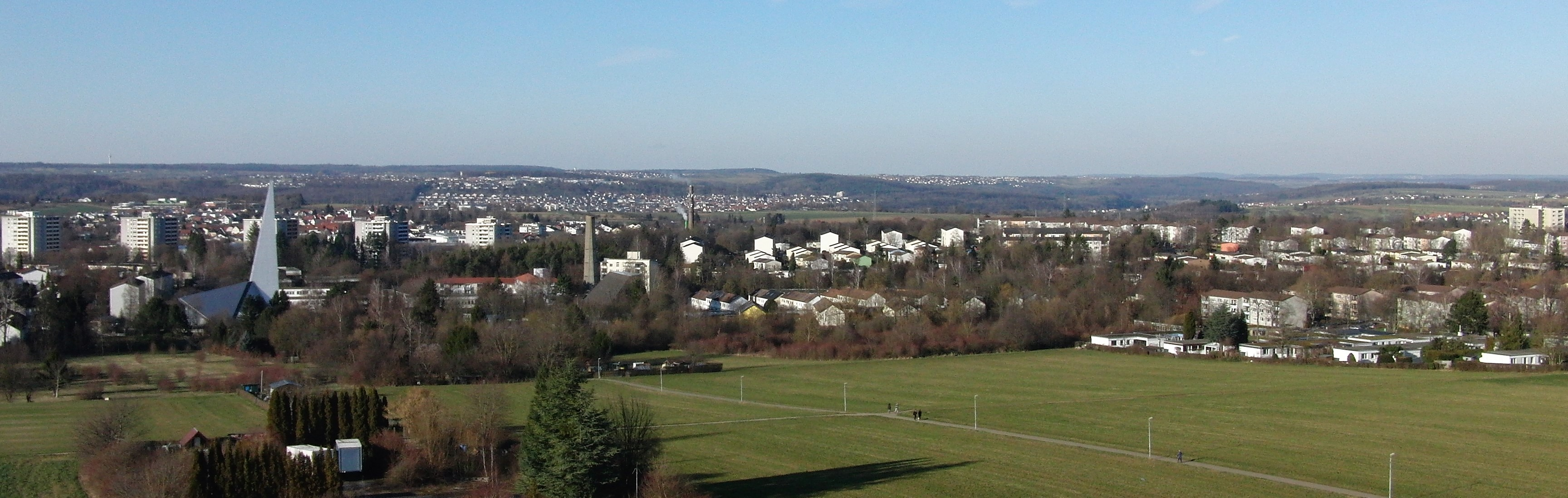 Vom Hochhaus Tannenberger Str. 66 aus. Links St. Andreas-Kirche, dahinter die Hochhäuser Frankfurter Straße, dahinter Rommelsbach. Mitte Jubilatekirche, dahinter Pliezhausen